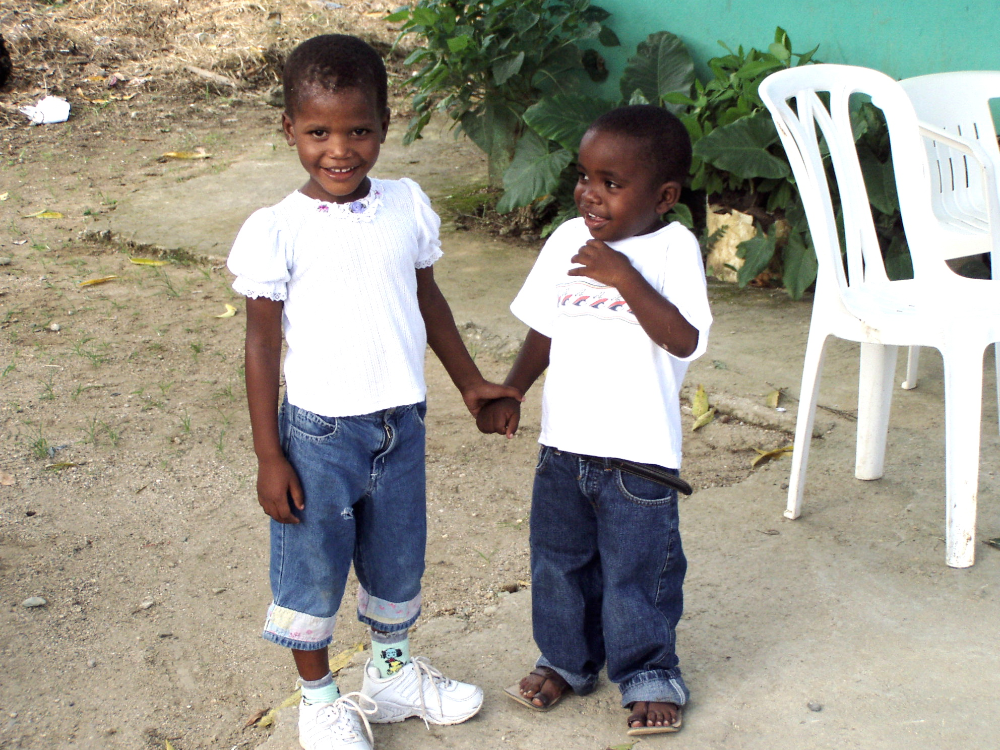 Missione genovese del Guaricano - Santo Domingo (Dominican Republic) - Foto di Donpaolo